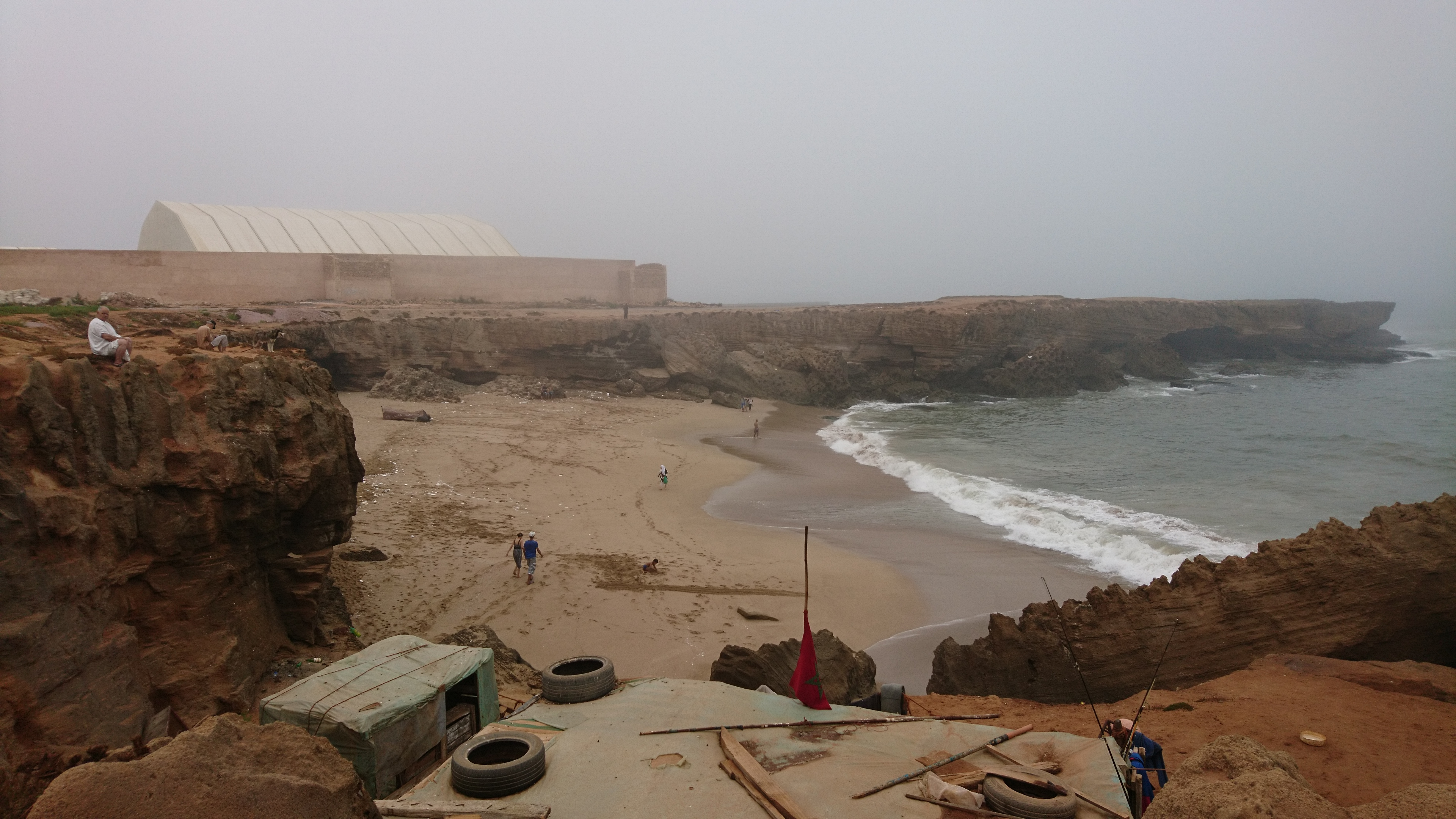 قصبة كًناوة و المحيط الأطلسي بسلا